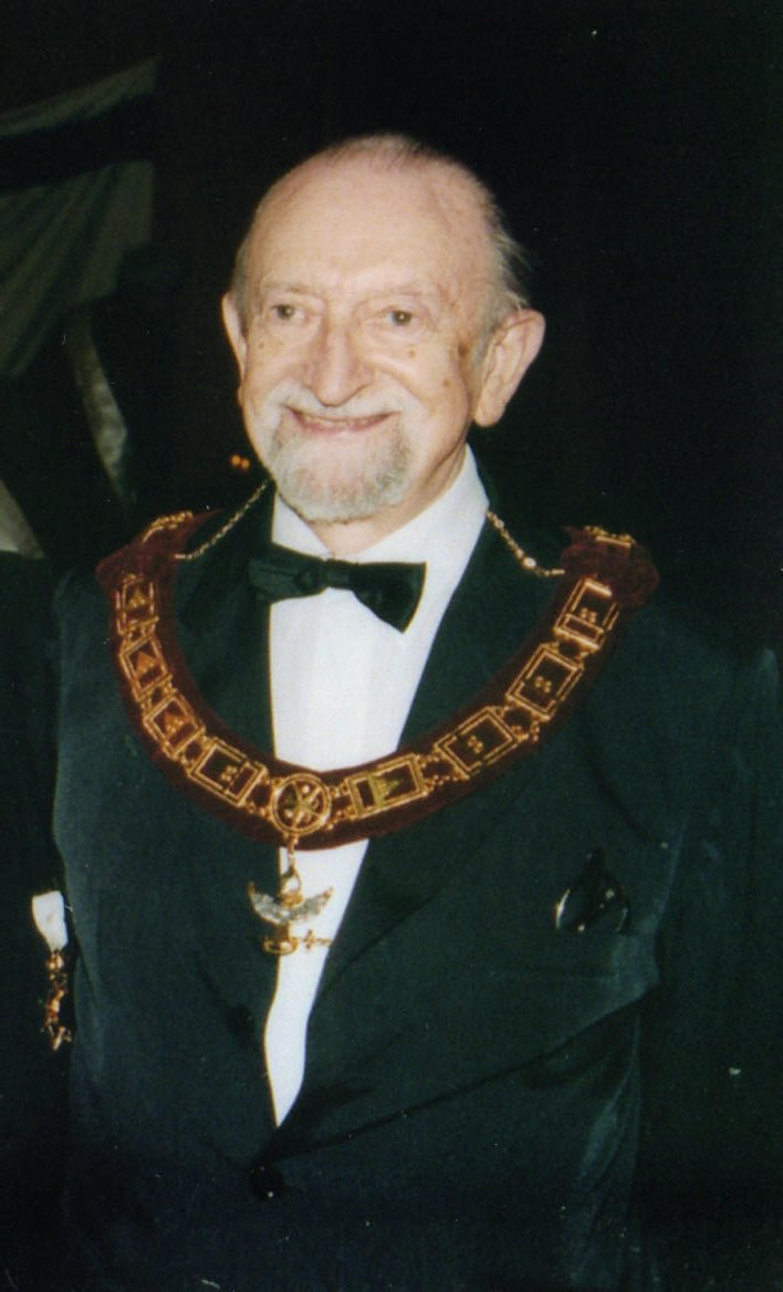 León Zeldis Mandel escritor israelí especializado en temas masónicos